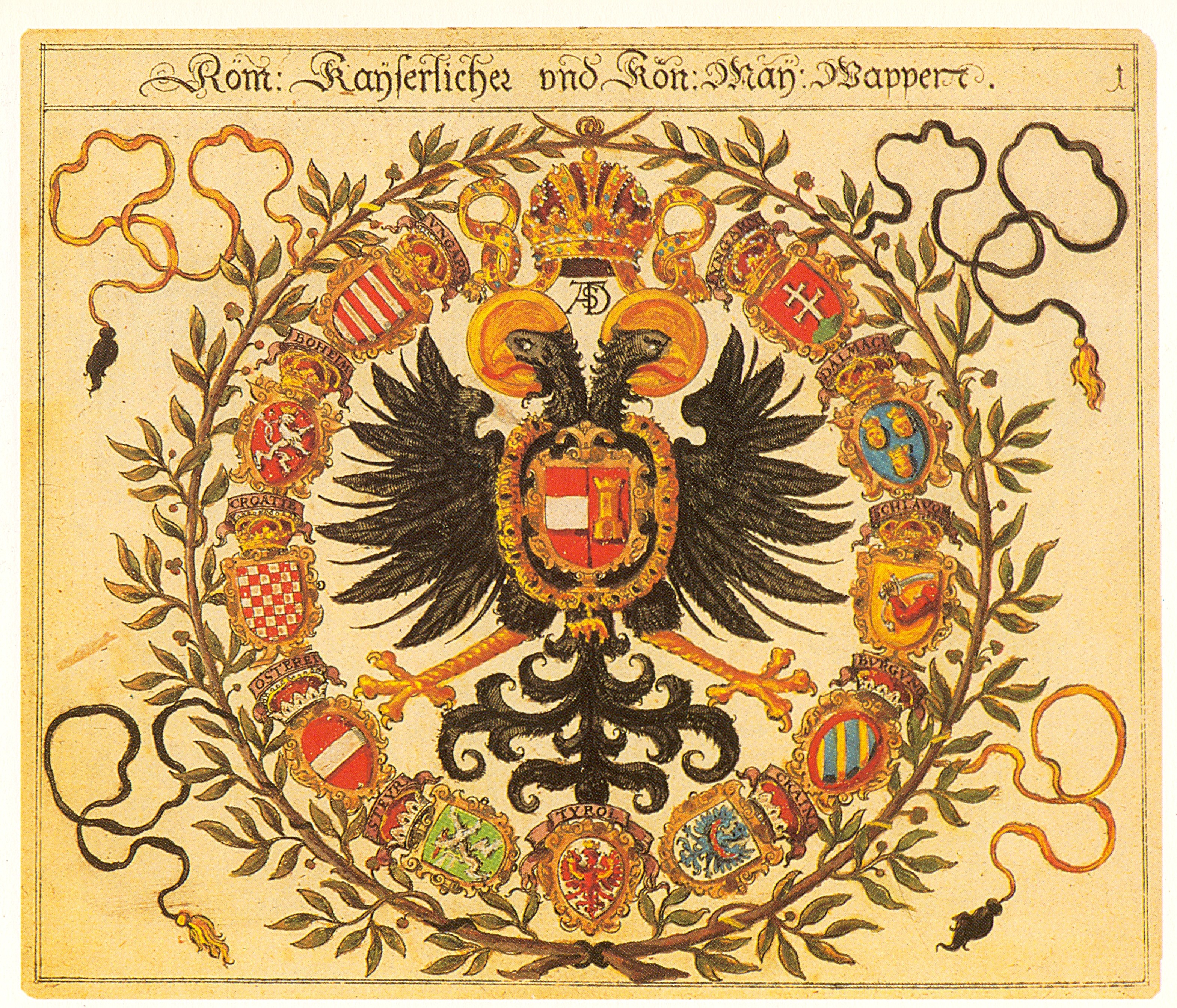 Johann Siebmacher: New Wappenbuch Wappen des Kaisers und Königs des Heiligen Römischen Reiches Blatt 1